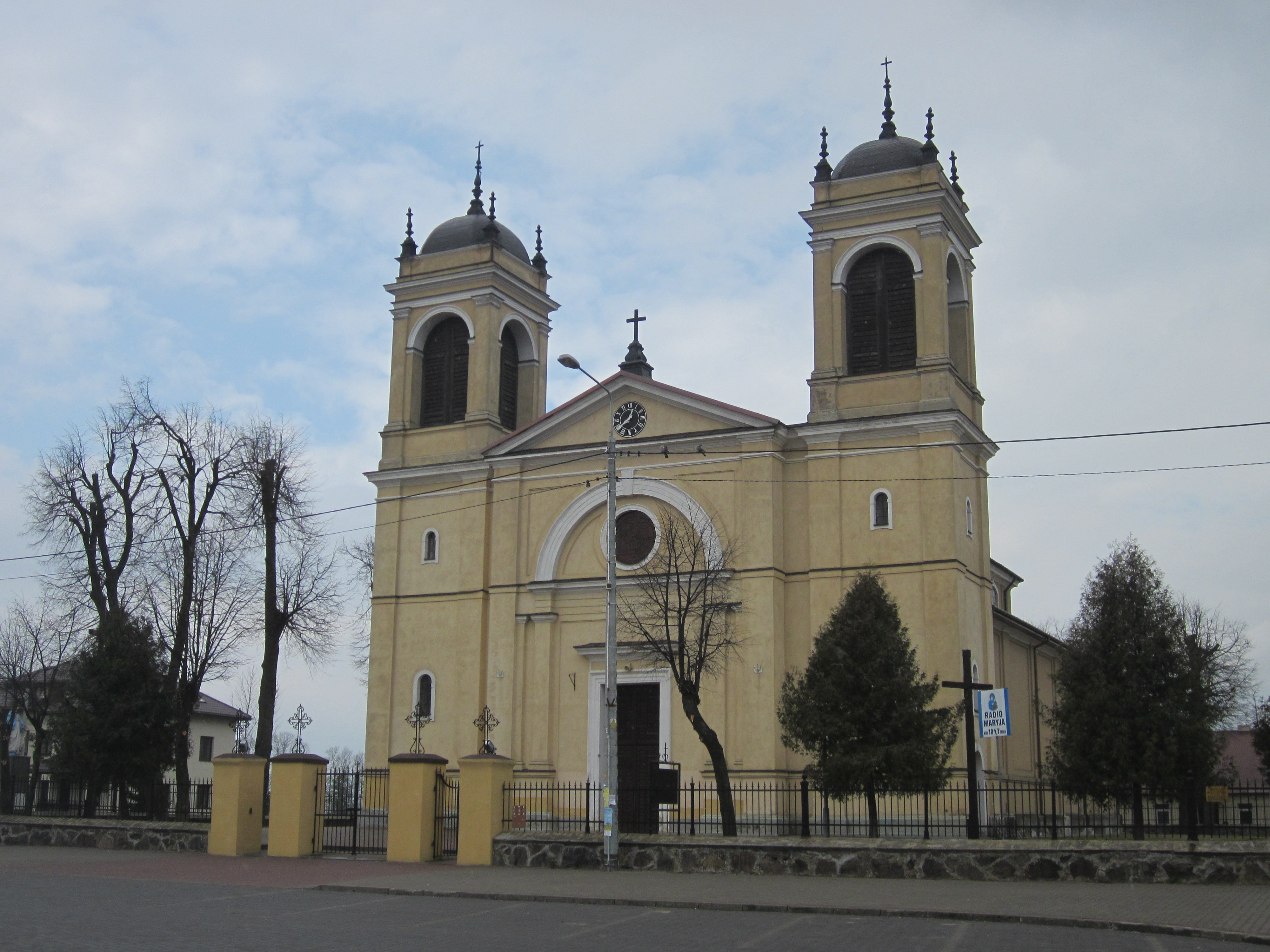 ul. Duży Rynek 15